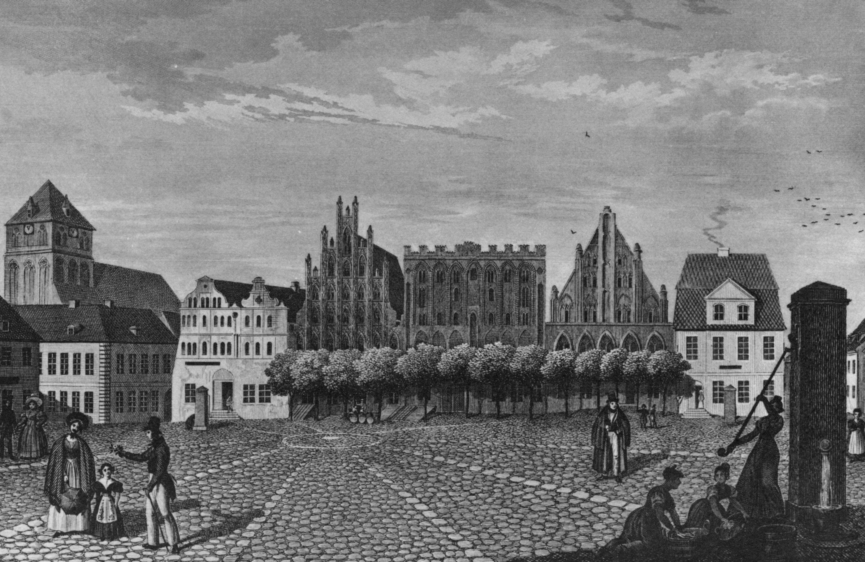 Greifswald, Marktplatz von Südwesten um 1840 (Nach einer Zeichnung von Johann Gabriel Friedrich Poppel)